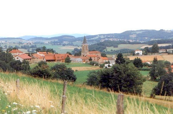 Croizet Vue générale